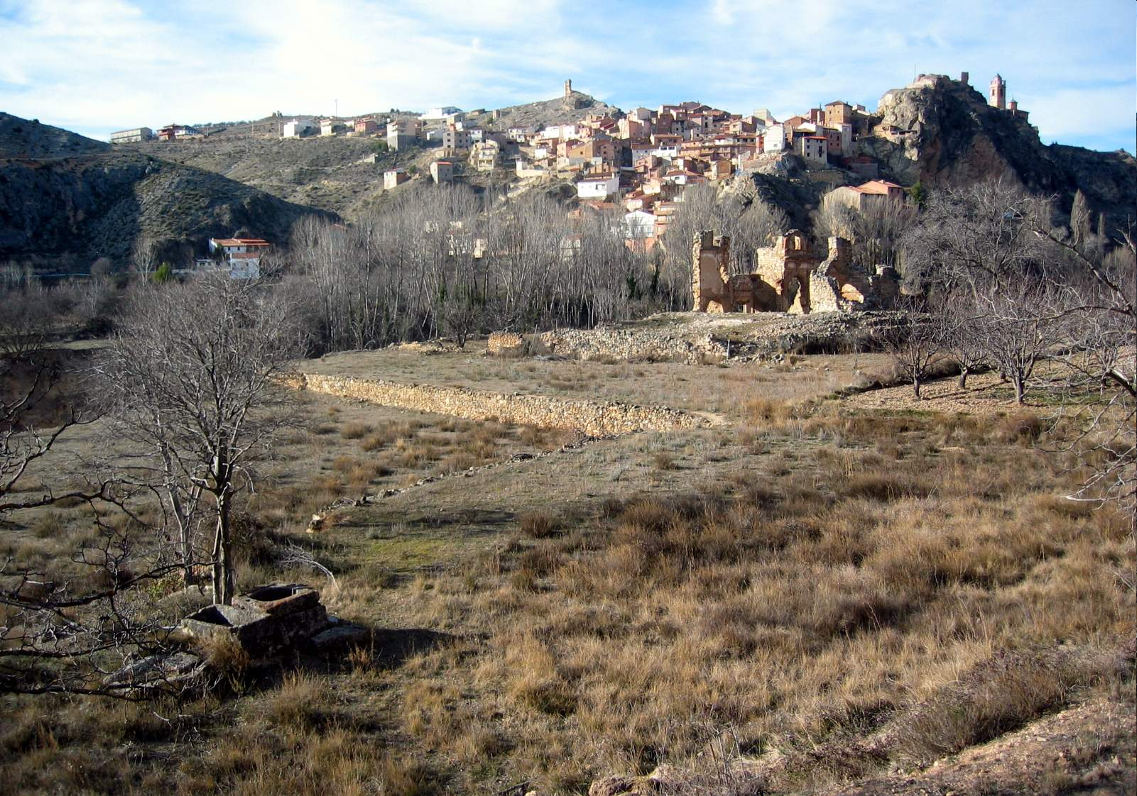 Camino del Hituelo en Castielfabib (Valencia), con detalle de la villa al fondo.